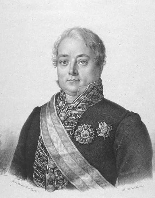 Retrato de Francisco Javier de Burgos.